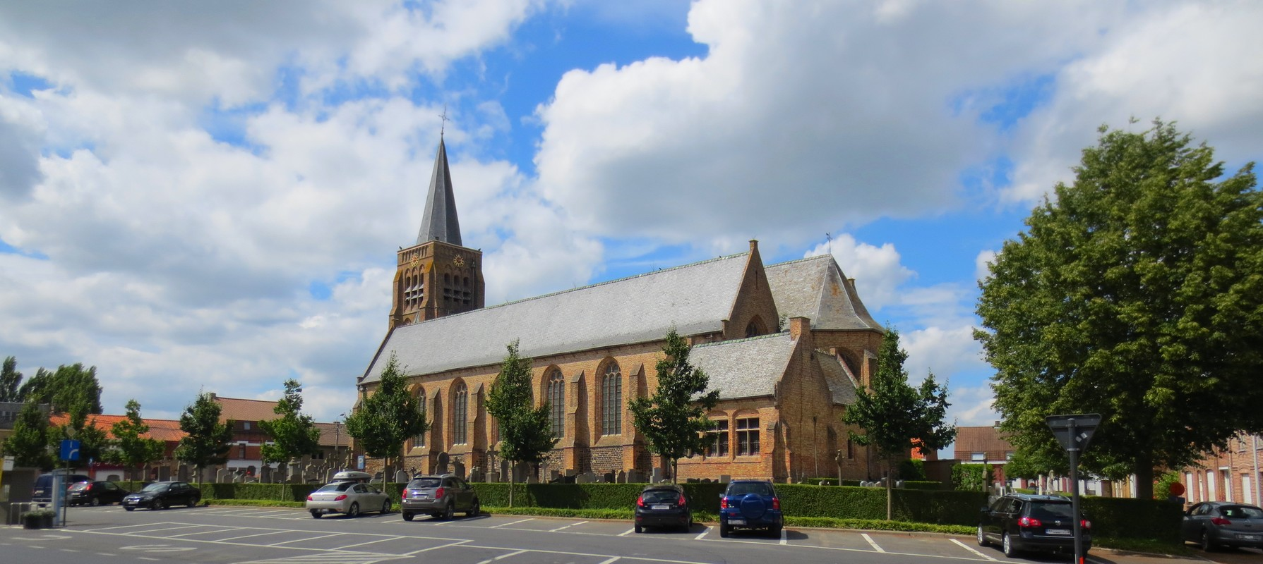 Dranouter